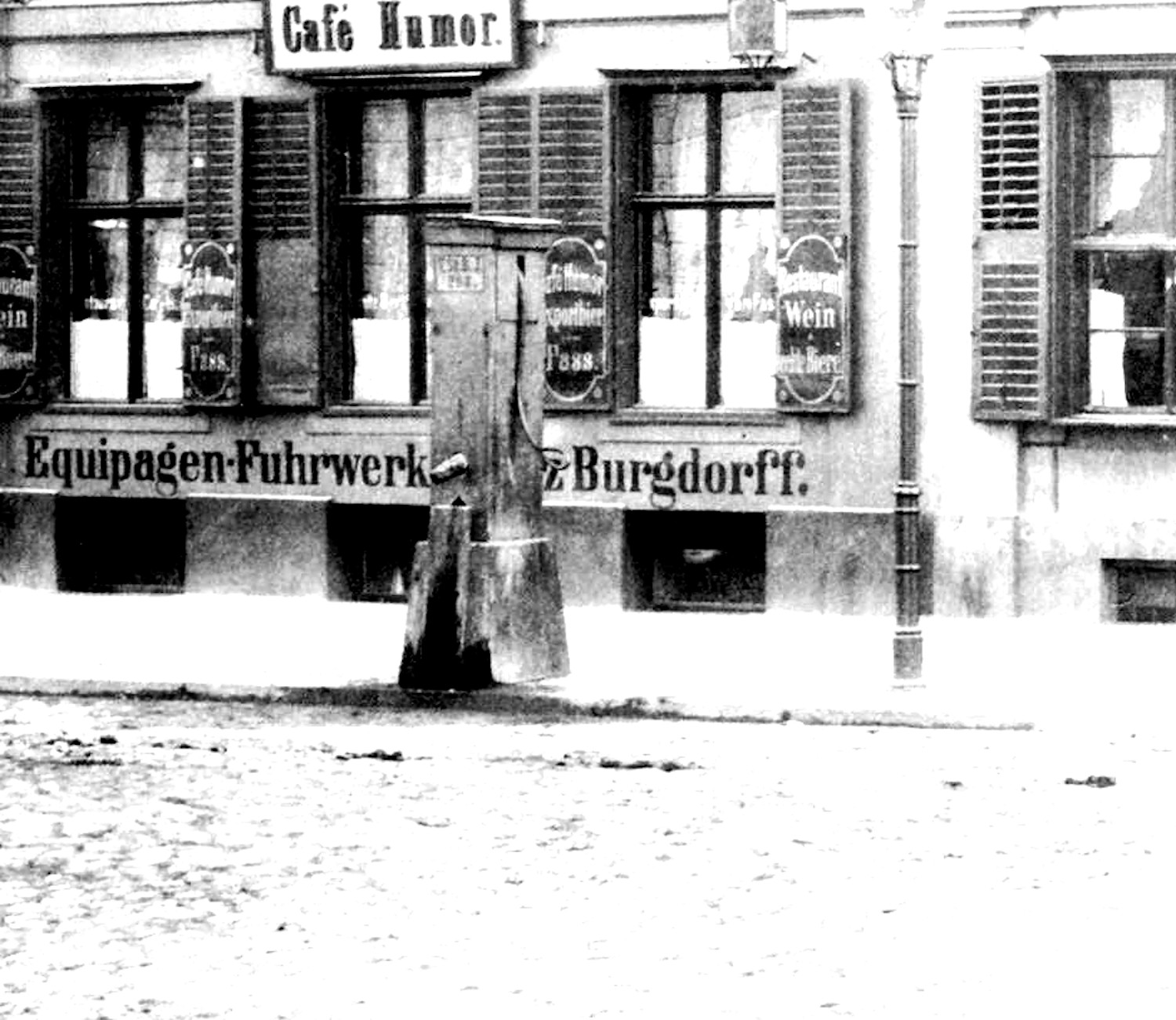 Das Bild ist ein Ausschnitt aus der Fotografie Jäger Straße No. 11 u. 12 von F. Albert Schwartz, Datierung Berlin, 1886 mit der Inventarnummer IV 65/780 V. Im Ausschnitt erfasst ist der Kastenbrunnen über dem Kesselbrunnen an dieser Hausfront. Auf dem Bild ist er im linken Drittel vor dem Gebäude 12: Café Humor abgebildet. Die Aufnahme erfolgt etwa von Jägerstraße 64, damals dem Königlichen Leihamt 1. Abtlg. aus.